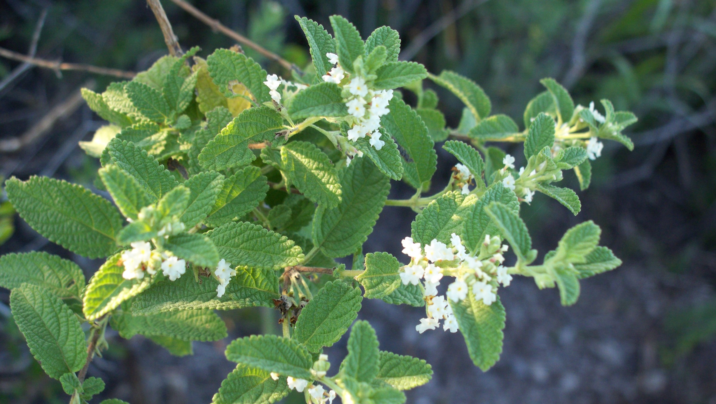 Hierba oleoginosa usada en medicina alterna tradicional